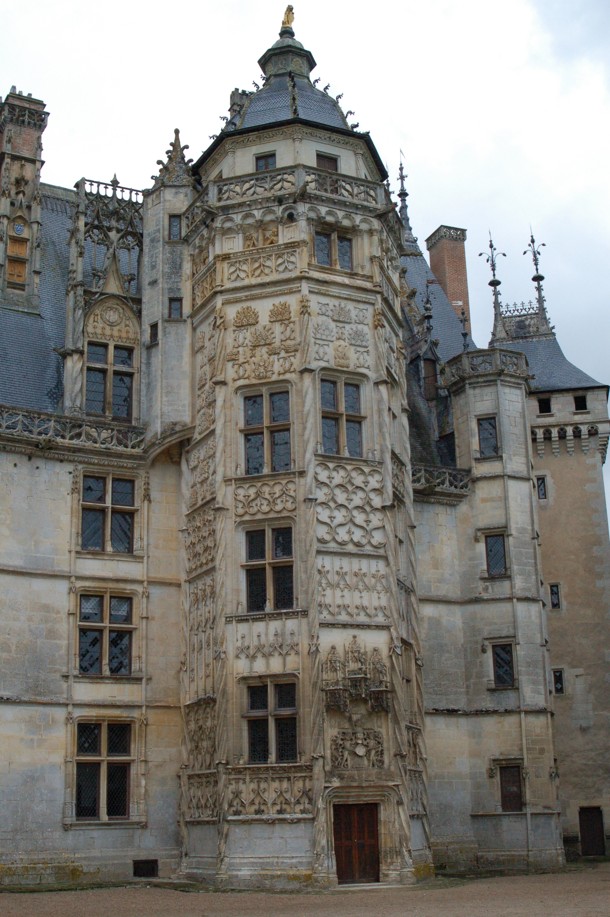 Tour de l'escalier d'honneur du château de Meillant (Cher, Centre, France)